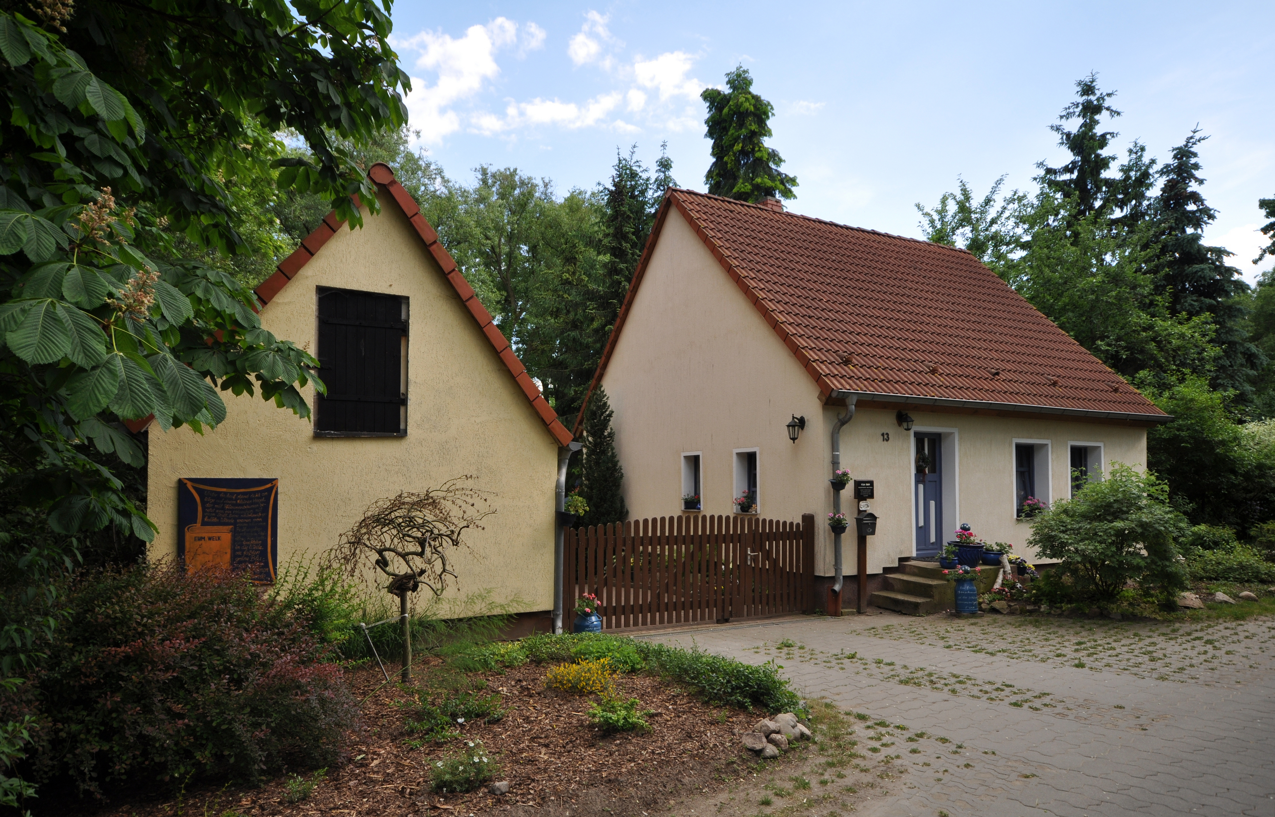 historic building in Biesenbrow, Schäferweg 13, birth house of Ehm Welk